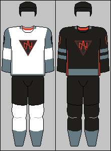 Team North America U23 jerseys from World Cup of Hockey 2016 ... Big thanks to Realismadder for a large share on these jerseys.